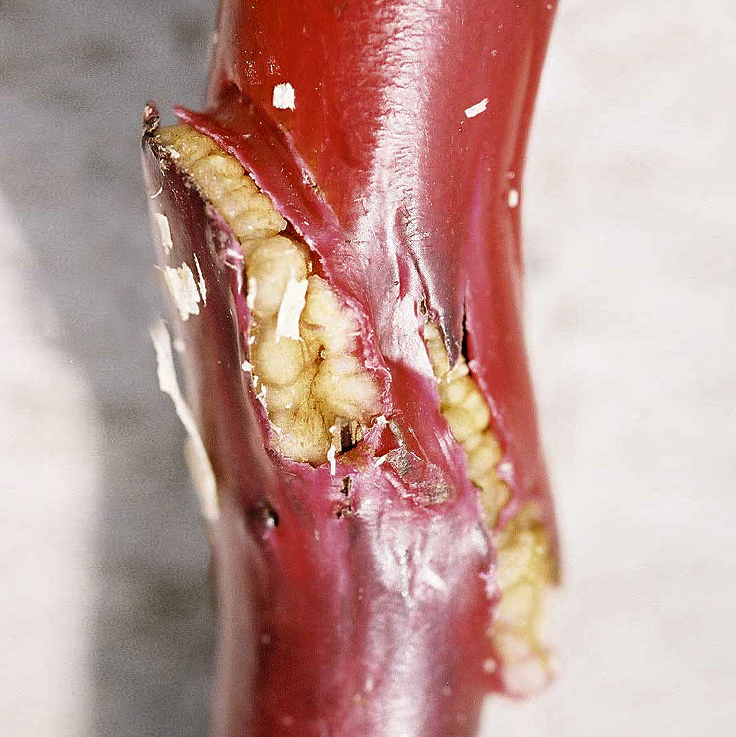 Die gut angewachsene Veredelungsstelle einer Rebe (Grüner Veltliner auf Kober 5BB) rot ist das Rebwachs (zum Schutz der Veredelungsstelle) Foto von Pressefotograf Clemens PFEIFFER, Wien